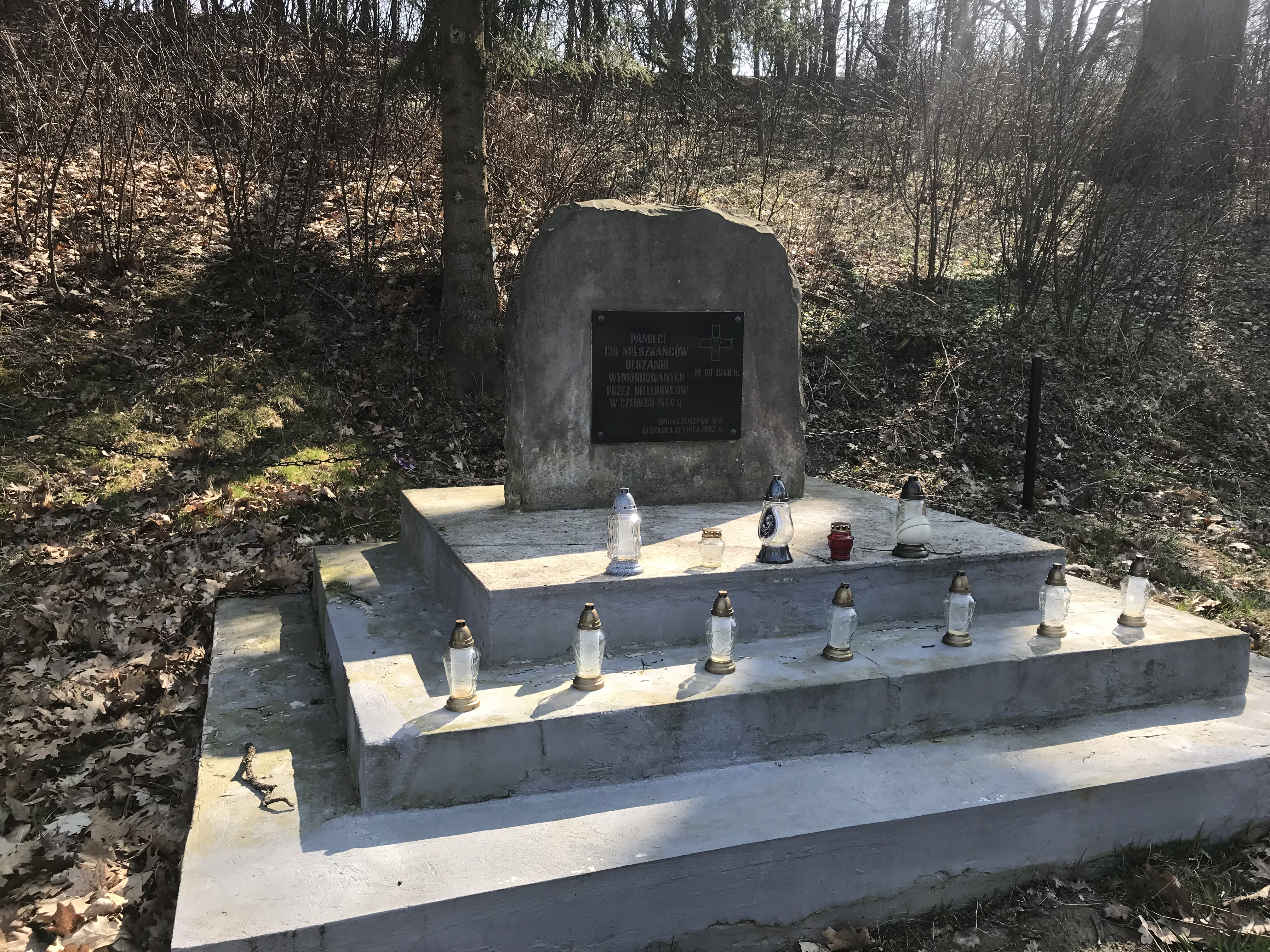 Pomnik pamięci 138 mieszkańców Olszanki wymordowanych w czerwcu 1944 roku przez Niemców